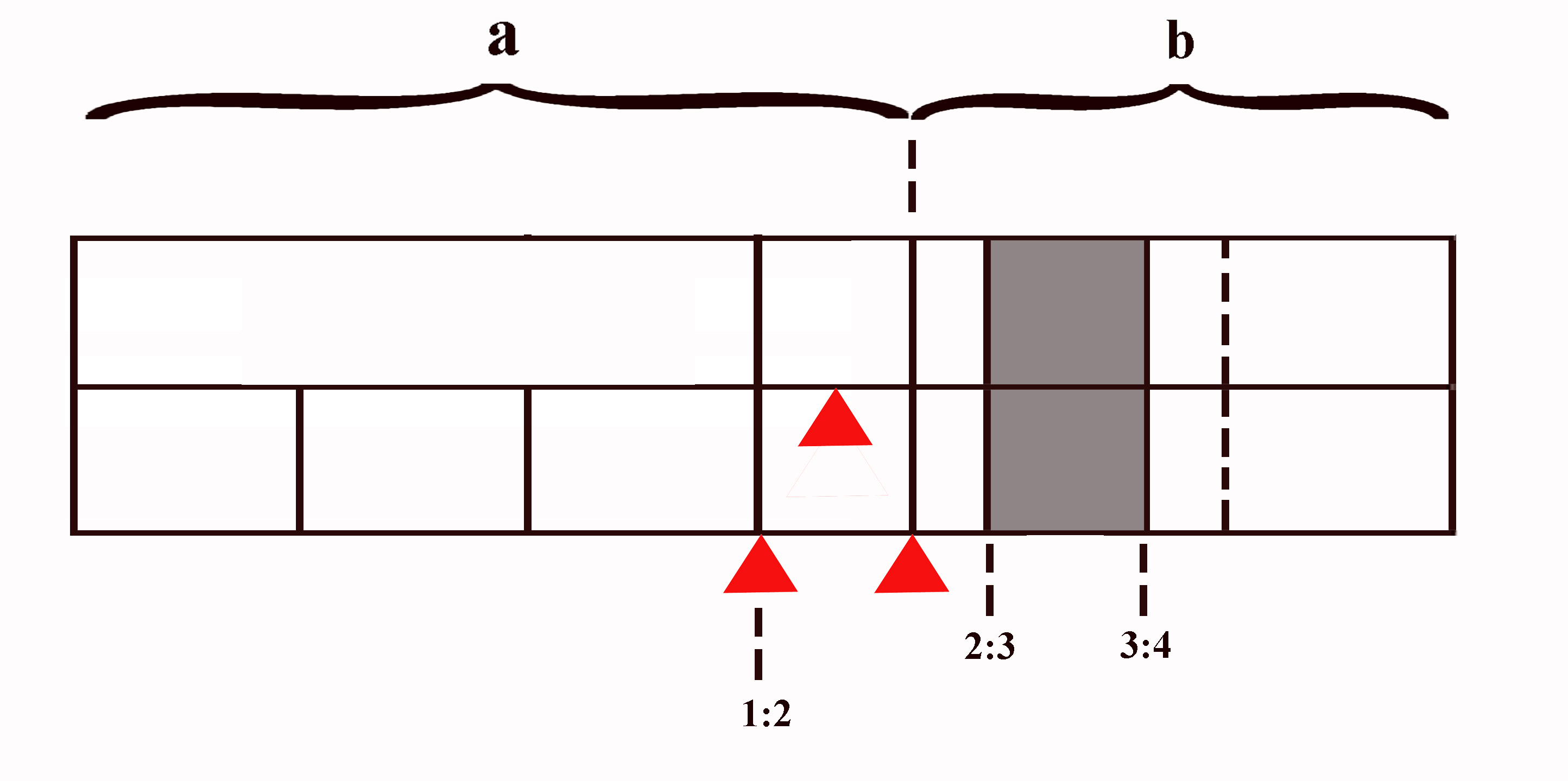 Análise estrutural do moteto Entre Copin/Je me cuidoie/Bele Ysabelos, Codex de Montpellier nº 256